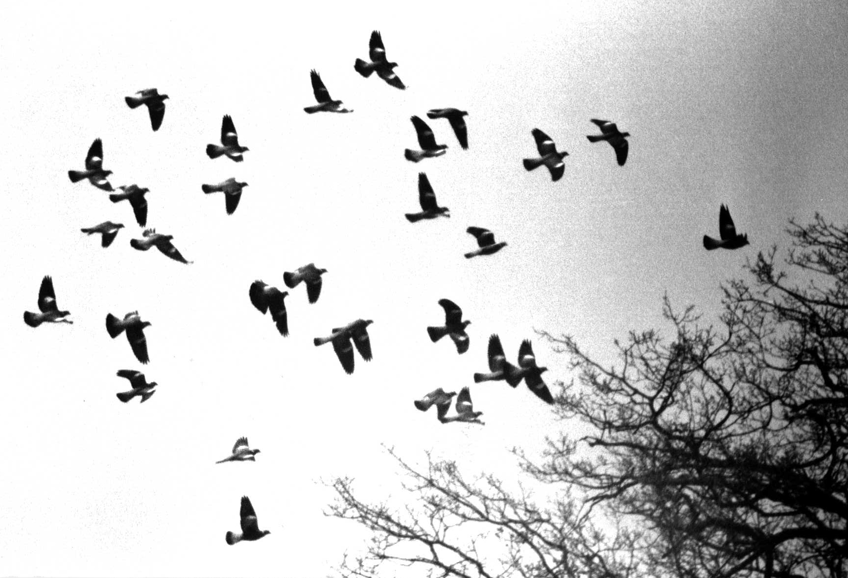 Trente pigeons ramiers longs migrateurs (Columba palumbus) franchissent le col de l'Escrinet (Ardèche, France) author : G.Duc